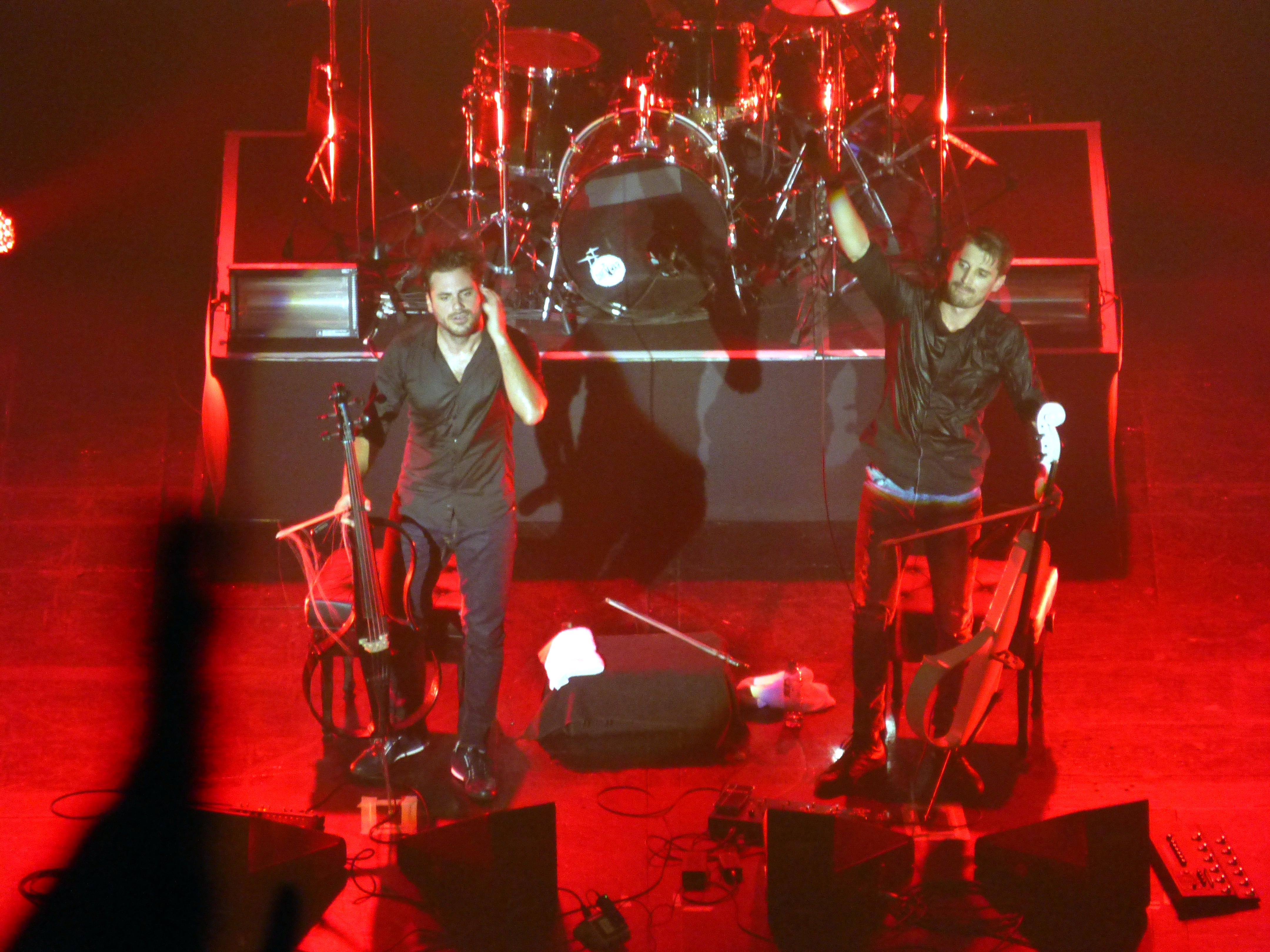 El dúo esloveno-croata 2CELLOS en su presentación en el Teatro Gran Rex de la ciudad de Buenos Aires, Argentina.